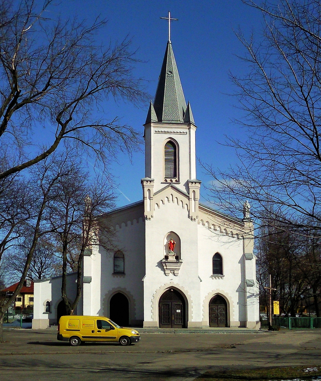 Stary Sielec. stanowiący teren dzisiejszej parafii św. Barbary w Sosno­wcu był już znany w połowie XIV wieku. W 1363 r. Kazimierz Wielki przeniósł wieś z prawa polskiego na prawu niemieckie. W 1386 r. królowa Jadwiga po­twierdziła sprzedaż Sielca Wisławowi i Piotrowi z Mysłowic. Pod względem kościelnym do czasu kongresu wiedeńskiego i jego decyzji politycznych nale­żał do parafii Mysłowice. Po przeprowadzeniu podziału parafii Mysłowice ze względów politycznych z wiosek znajdujących się w Królestwie Polskim bi­skup krakowski Jan Paweł Woronicz utworzył parafię w Niwce 17.03.1826. W 1854 r. siedziba parafii .Niwka została przeniesiona do Zagórza. W następ­stwie tych decyzji Sielec także zmienił swoją przynależność parafialną. Z pa­rafii Mysłowice przeszedł do parafii w Niwce. a w 1854 do Zagórza. Na sku­tek usilnych zabiegów, popartych faktem wybudowania świątyni, mieszkań­ców Sielca. administrator diecezji kieleckiej Ks. Franciszek Brudzyński ery­gował tutaj parafię 19.08.1908. wydzielając ją w całości z parafii Zagórze. Kościół parafialny murowany budowany w latach: 1906-1907 przez mieszkań­ców Starego Sielca. jeszcze przed erekcją parafii. Poświęcony 15.08.1907. Tytuł kościoła: św. Barbary PM; patronka parafii: Matka Boża Królowa Polski.